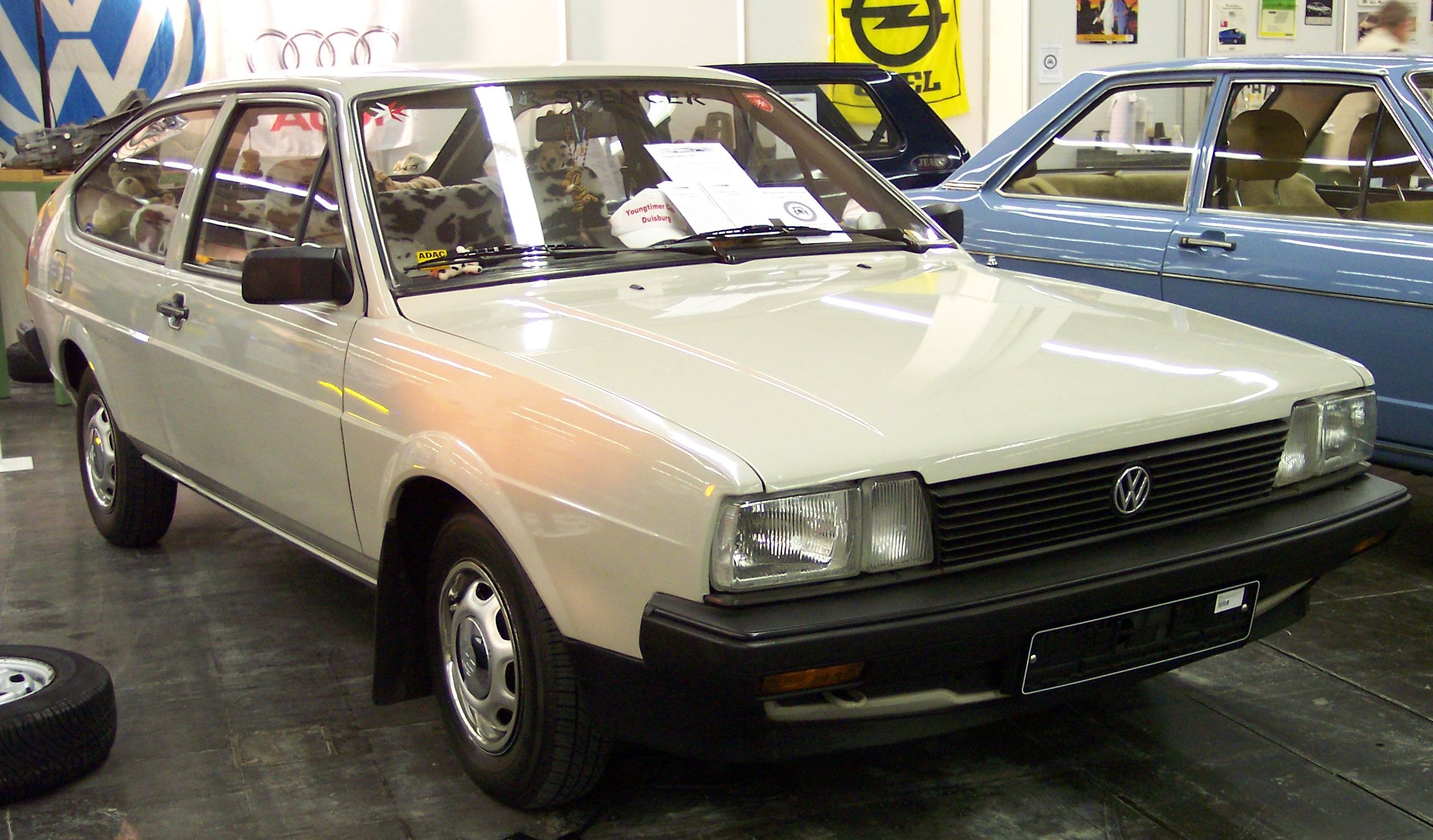 VW Passat